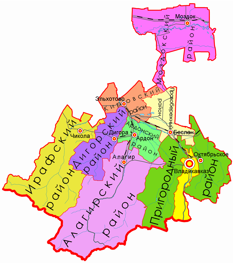 Administrative divisions of North Ossetia-Alania